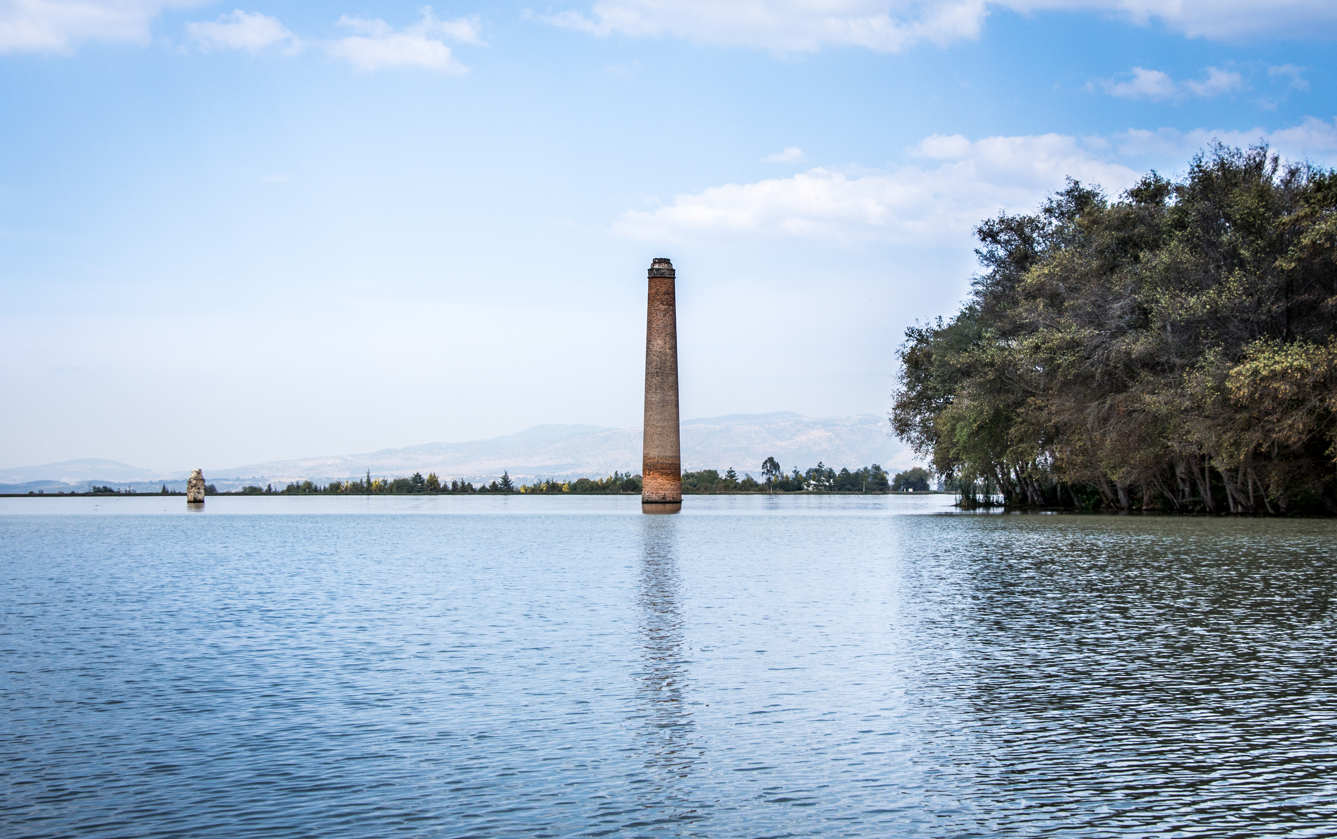 Huasca de Ocampo-7